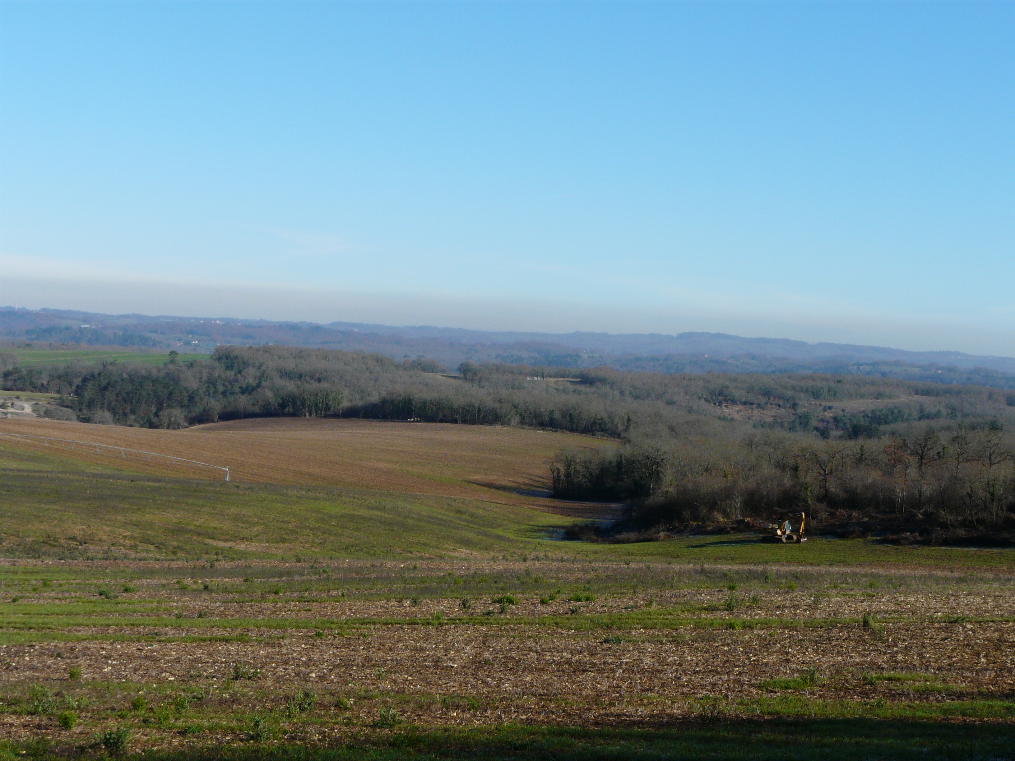 Le causse de Savignac vers Lalauvie, Saint-Jory-las-Bloux, Dordogne, France.